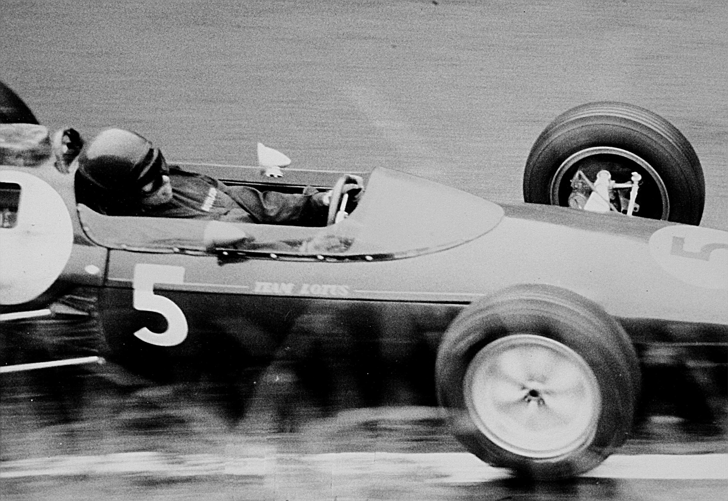 Jim Clark im Lotus 25 beim Großen Preis von Deutschland auf dem Nürburgring, Streckenabschnitt Hatzenbach